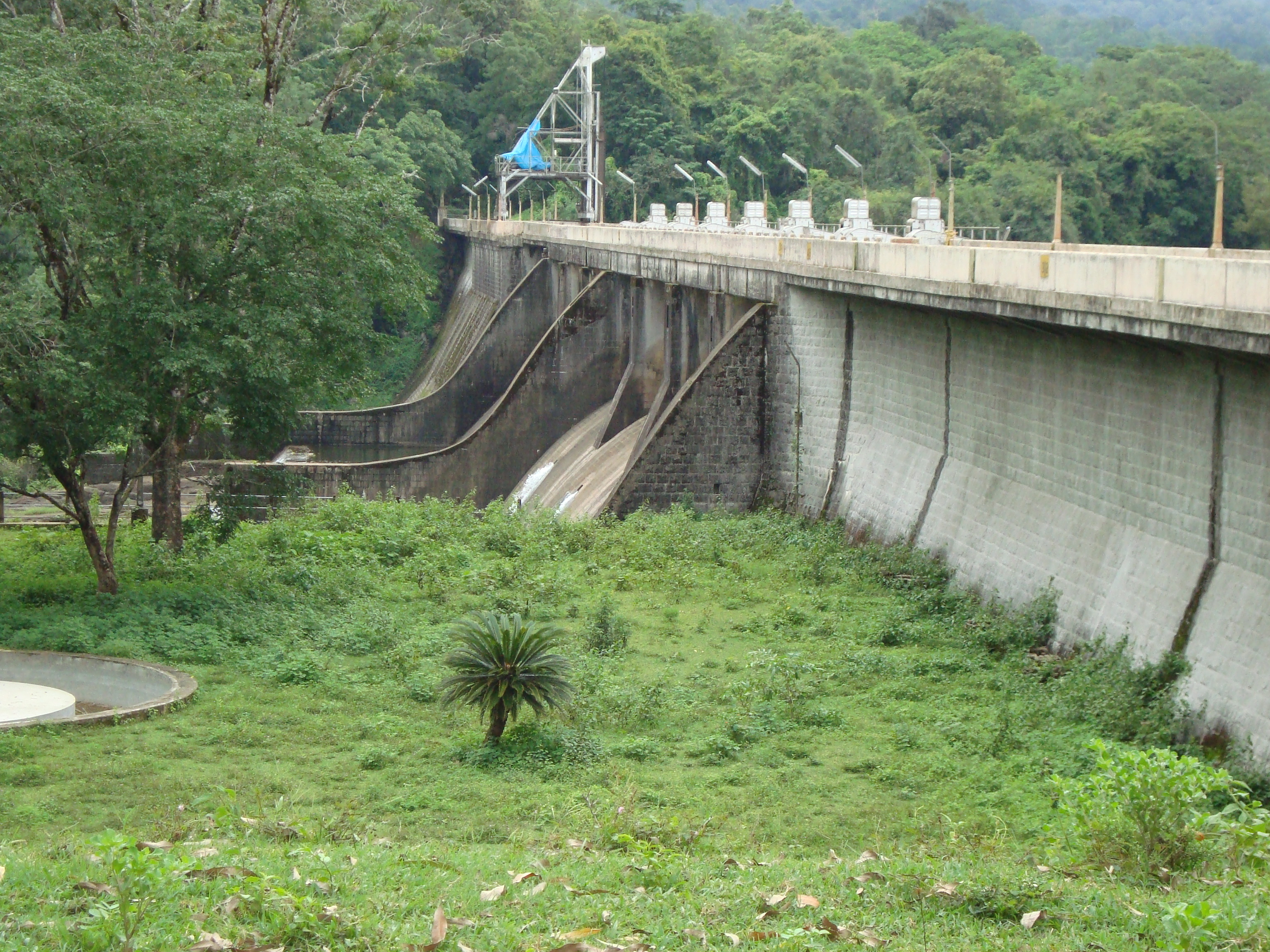 പെരിങ്ങൽകുത്ത് അണക്കെട്ട്